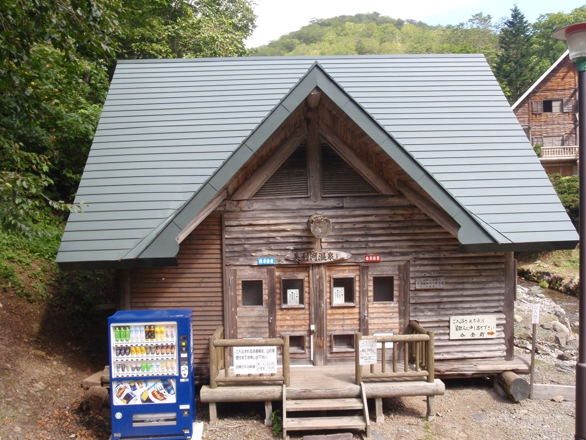 奥美利河温泉更衣室の外観